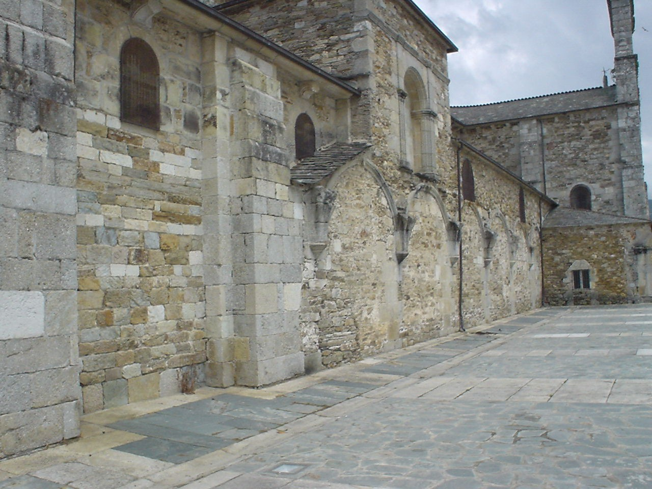 Kloster Meira, Galicien, Spanien, Gewölbeansatz des Kreuzgangs